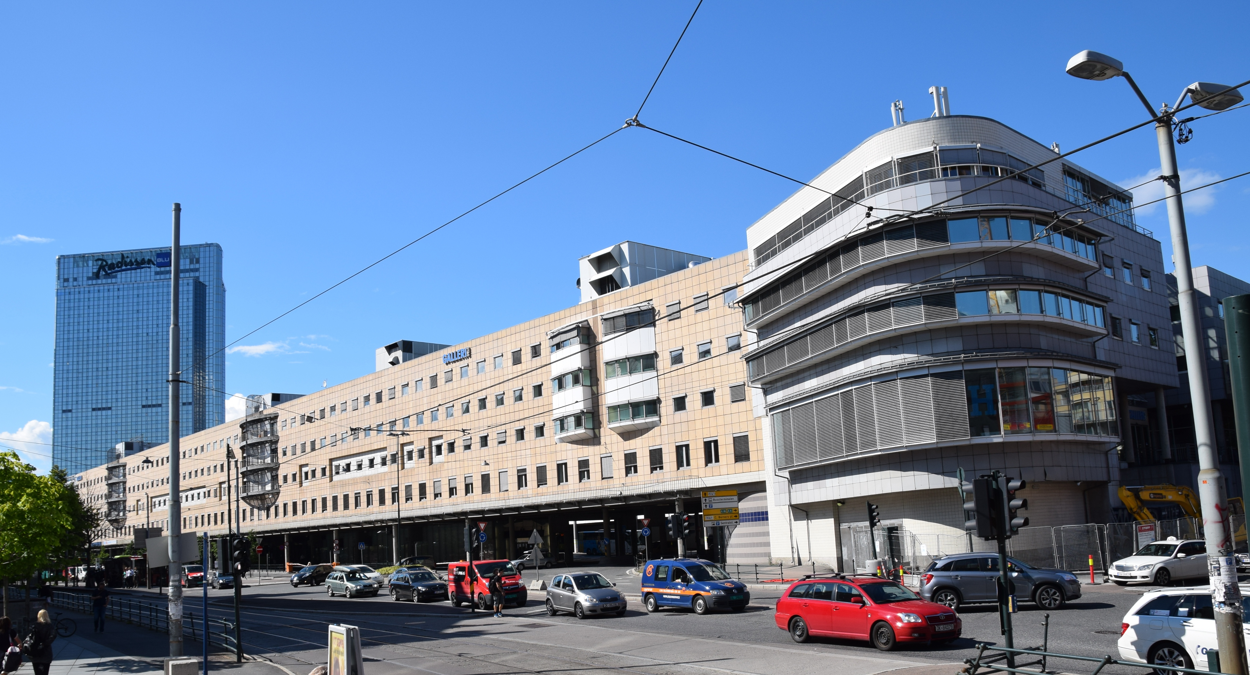 Galleri Oslo, Vaterland / Grønland, Oslo, seen from Annette Thommesens plass by Schweigaards gate